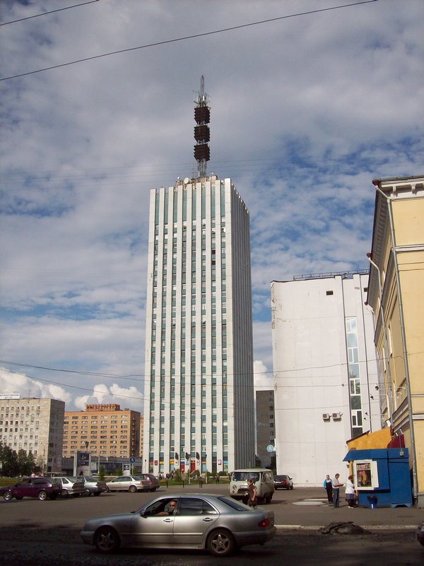 Высотное здание, Архангельск, июнь 2007